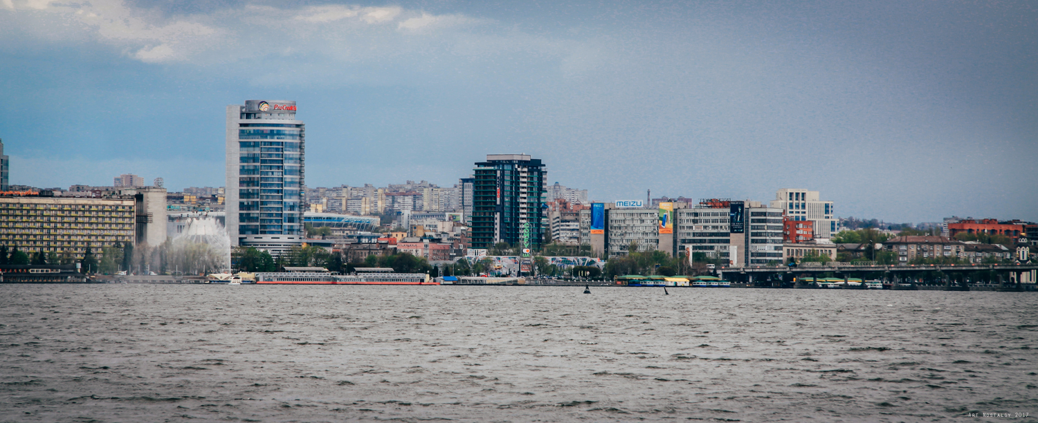 вид на ділову частину міста